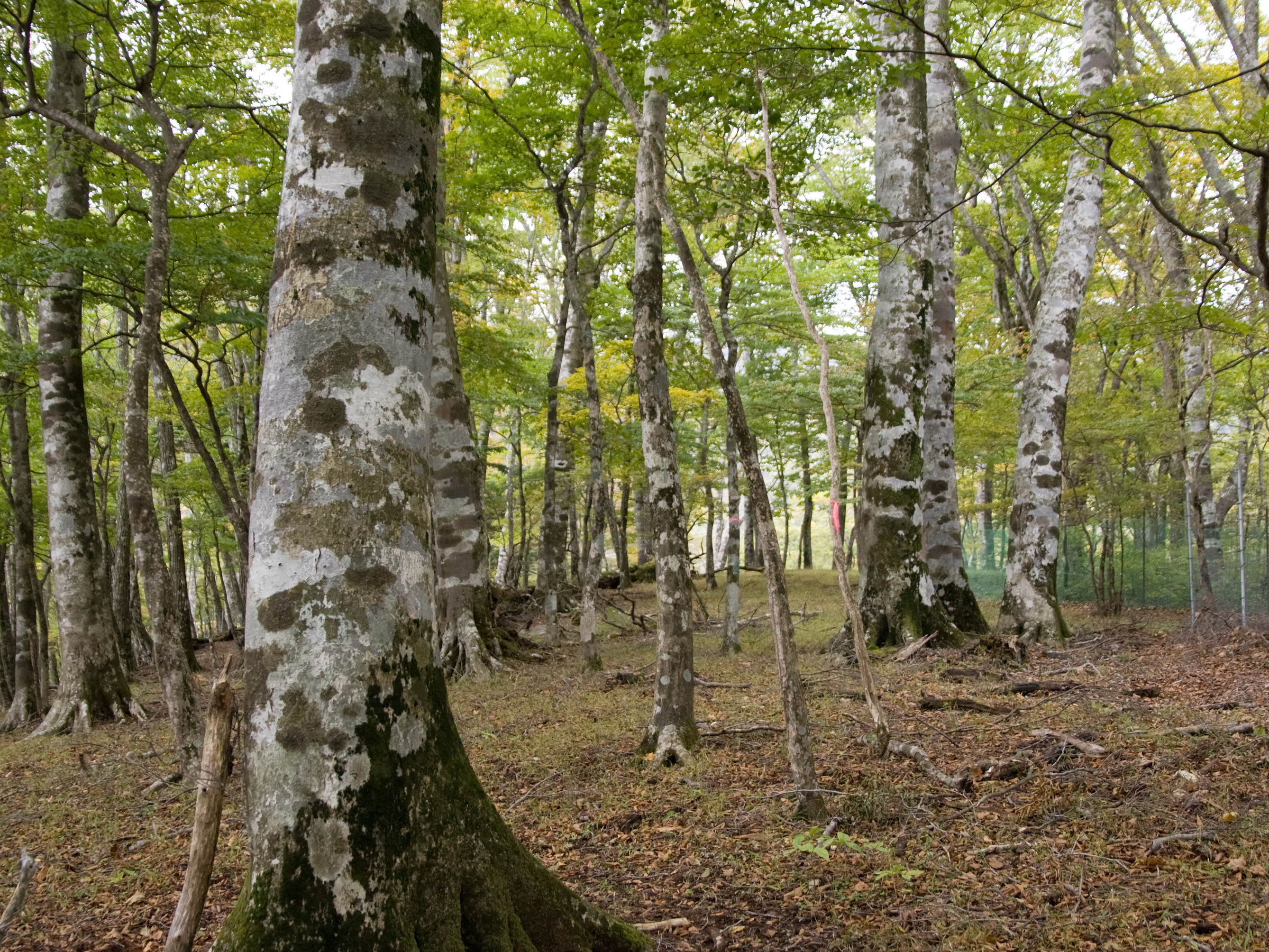 イヌブナ (学名:Fagus japonica)